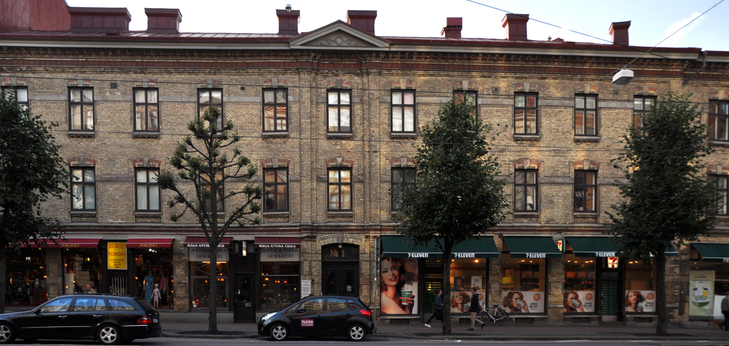 Linnégatan 1, del av kvarteret Skutan, stadsdelen Masthugget i Göteborg.